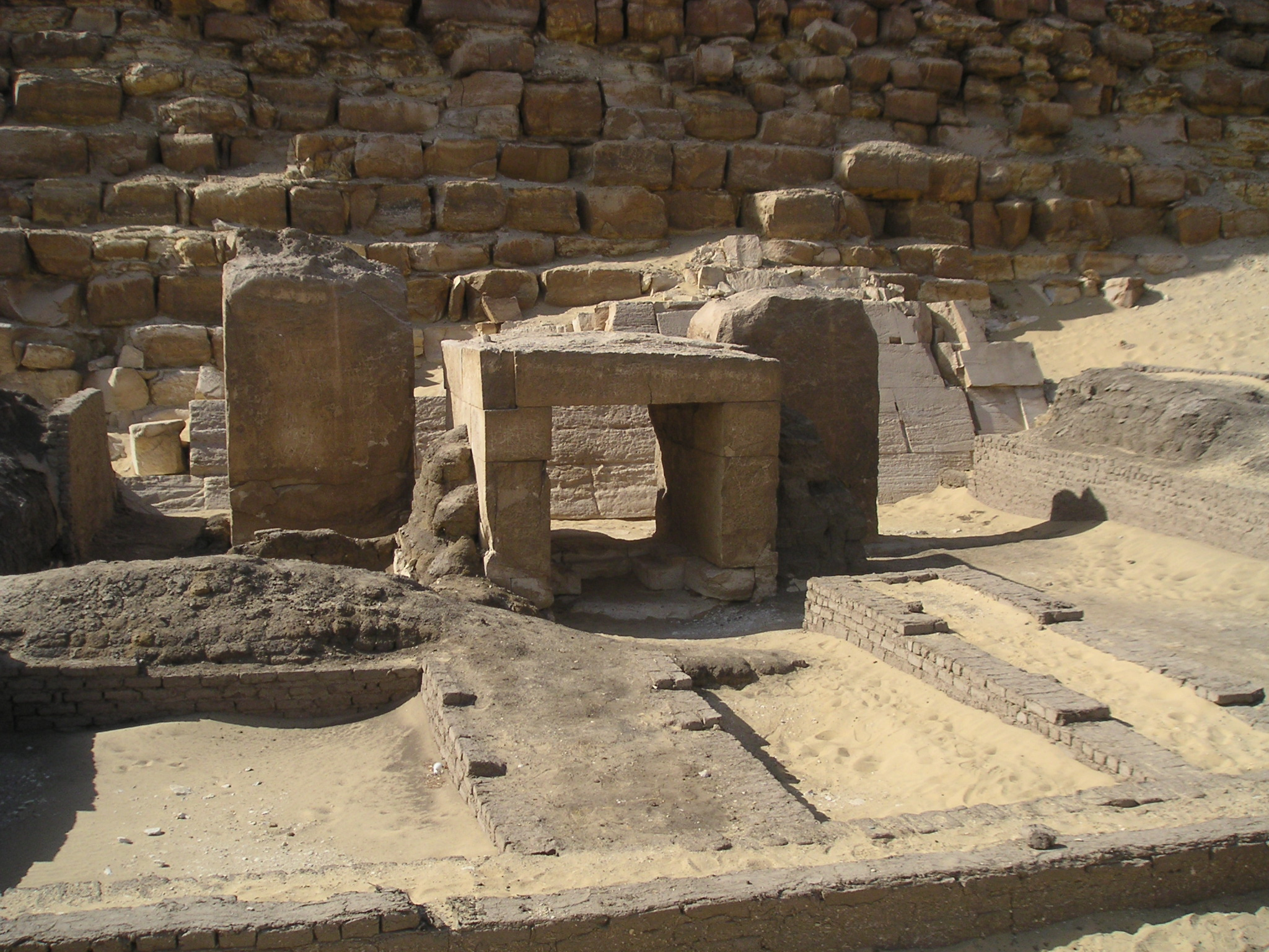 Vue du petit temple funéraire accolé à la face est de la pyramide rhomboïdale de Daschour - Règne de Snéfrou - IVe dynastie égyptienne